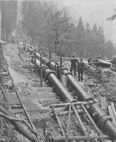 Kraftwerk Arniberg: Druckleitung auf den Fundamenten und zwischen den Verankerungen von P12. Links ist das kurze Stück Rohrleitung sichtbar, das als Vorbereitung für einen zweiten Rohrstang bereits in die Verankerung eingelegt wurde.